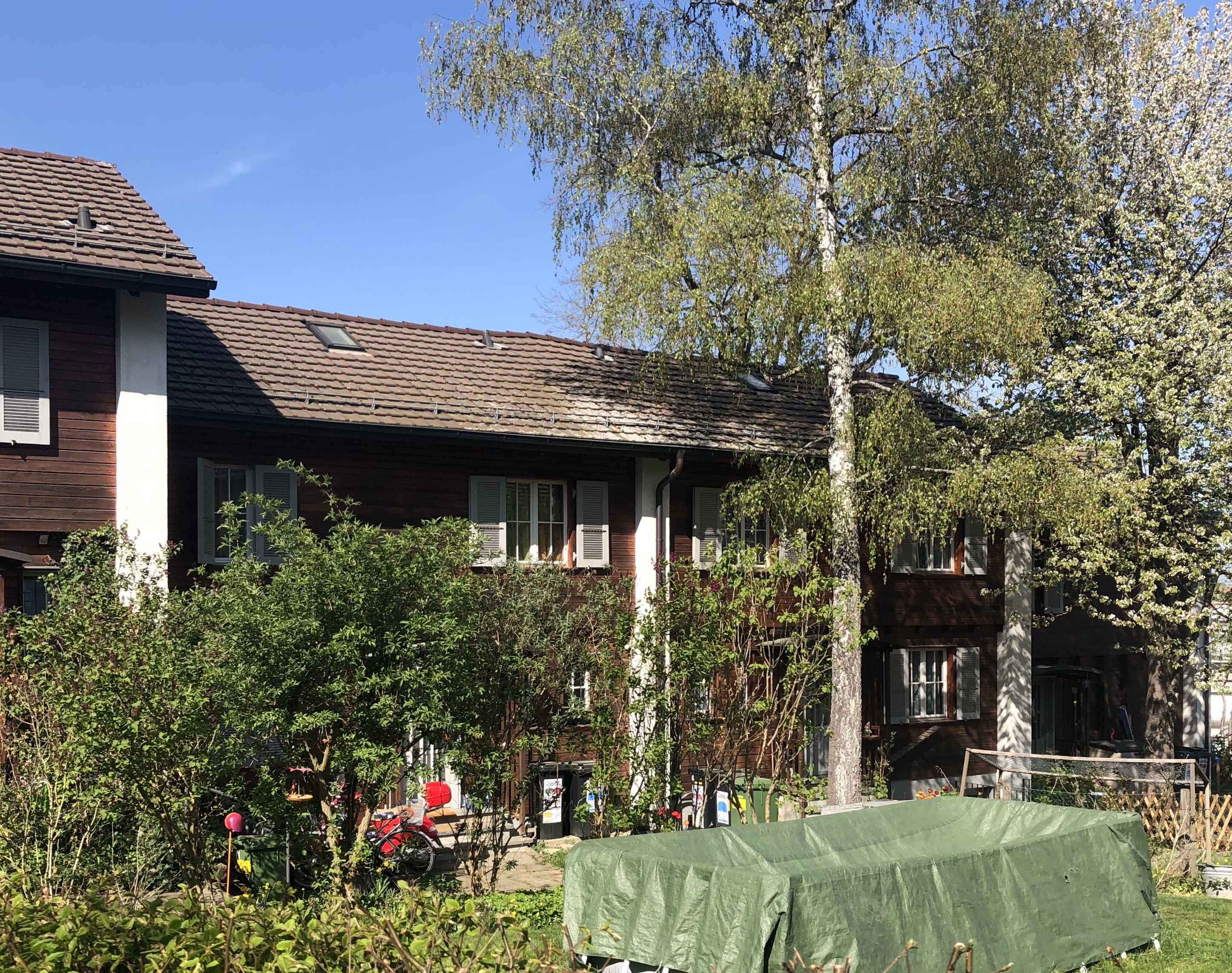 Hohliebe Siedlung